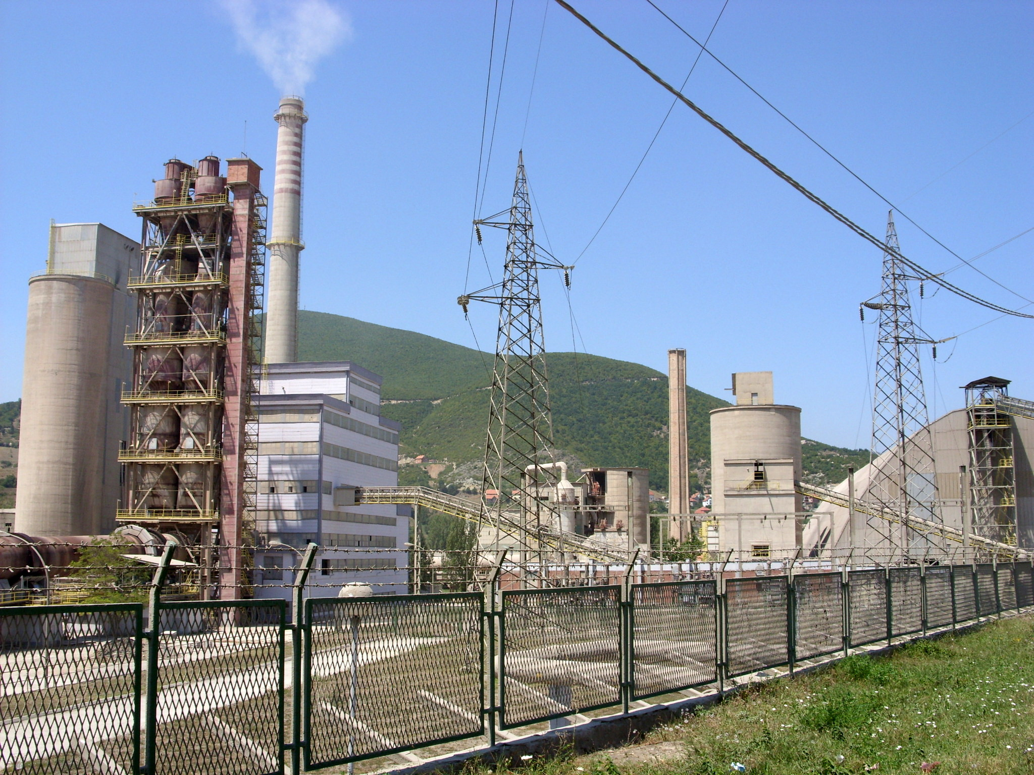 Industrie in Han i Elezit/Elez Han, Kosovo.